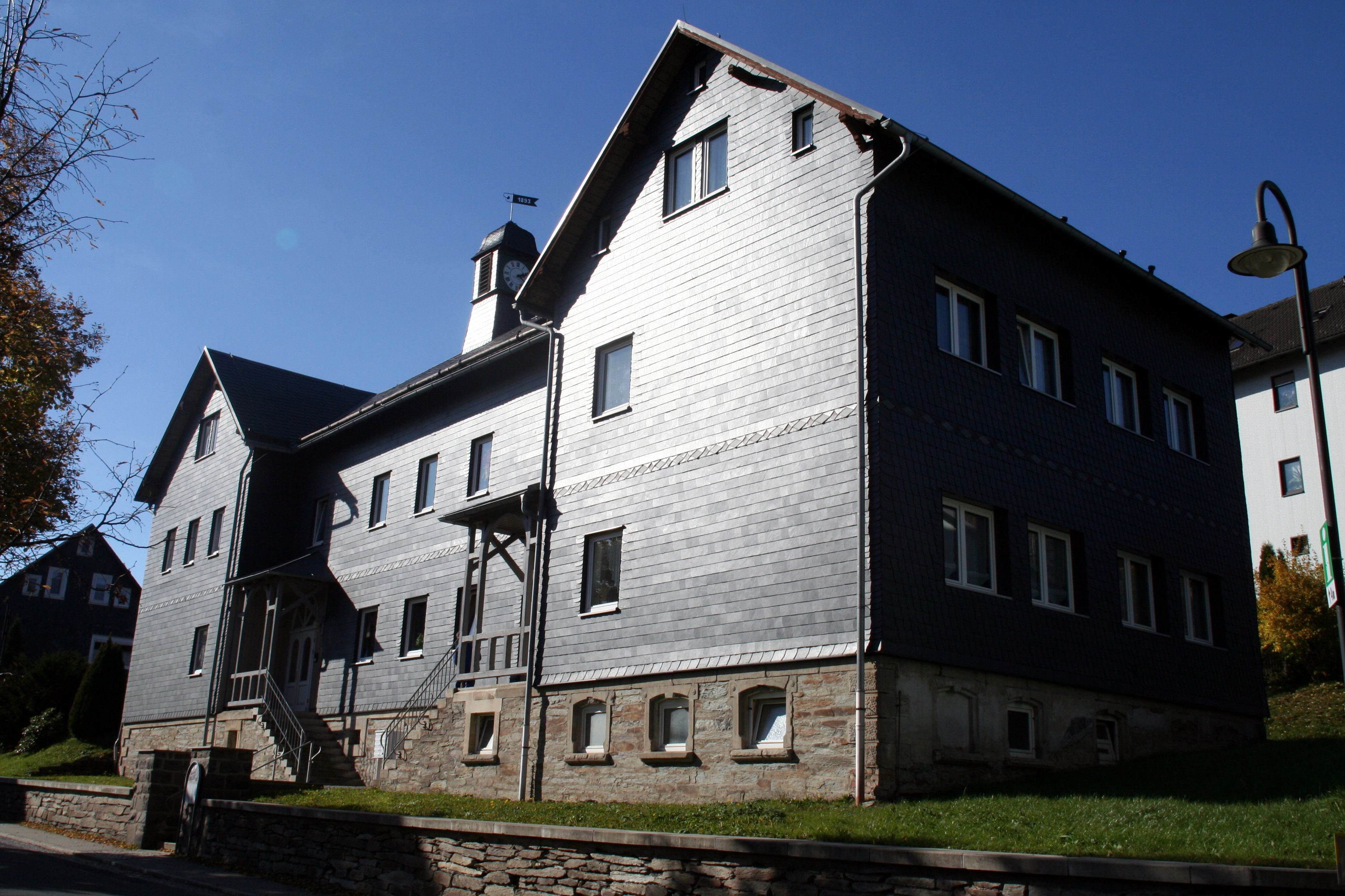 Piesau Alte Schule in Südthüringen